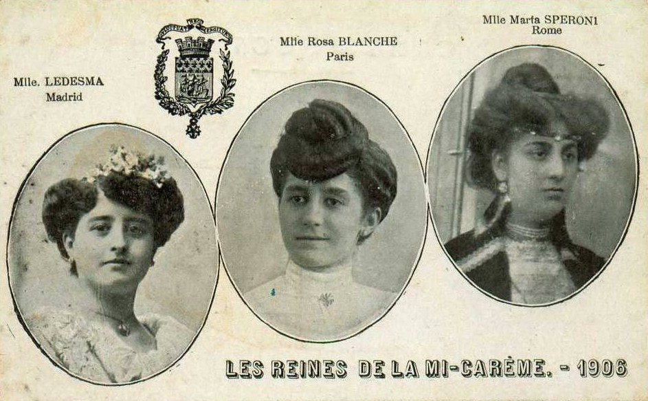 Carte-postale souvenir avec les portraits de la Reine des Reines de Paris, de la Reine de Rome et de la Reine de Madrid à la Mi-Carême 1906